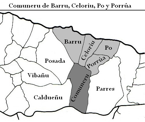 Mapa del territoriu mancomunáu de les parroquies de Barru, Celoriu, Po y Porrúa, nel conceyu de Llanes.